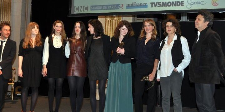 L'équipe du film L'Apollonide à la cérémonie des Prix Lumières. De gauche à droite : Bertrand Bonello, Iliana Zabeth, Pauline Jacquard, Maïa Sandoz, Judith Lou Lévy, Alice Barnole, Adèle Haenel, Noémie Lvovsky, X